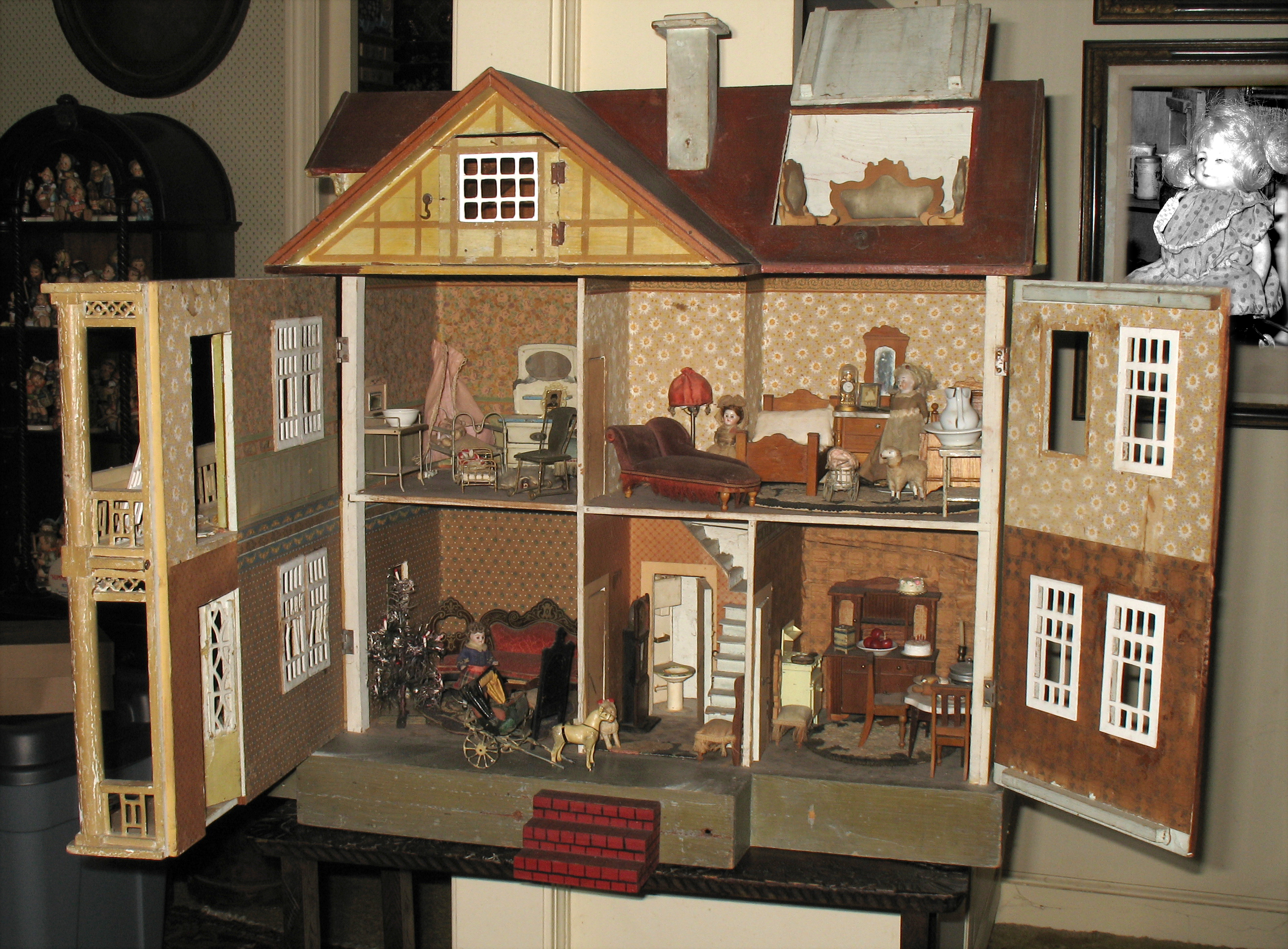 Antique English Doll House